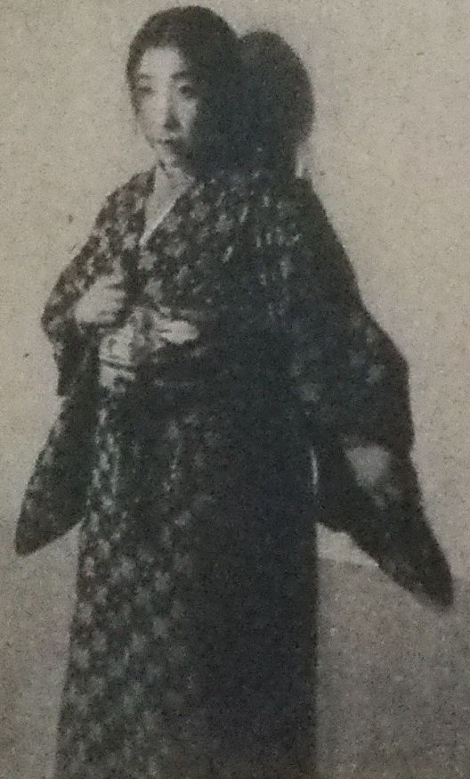 『何が彼女をそうさせたか』での山本安英